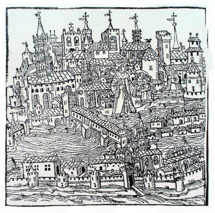 Cette gravure sur bois illustre l’ouvrage Gesta Tholosanorum écrit en 1515 par Nicolas Bertrand. Il s’agit d’une vue cavalière de la ville de Toulouse. Au centre, trois personnages sont représentés. Deux d’entre eux bâtissent un mur tandis que le troisième, couronné, revêtu d’un manteau à parement et collet d’hermine, avec un sceptre dans la main droite, montre du doigt la construction. Il s’agit probablement du roi Tholus, fondateur mythique de la ville, accompagné de deux artisans-maçons. Cette gravure ne représente pas la ville de manière fidèle. L’image de petite taille laisse peu d’espace pour la dessiner en totalité, c’est pourquoi l’auteur s’est attaché à représenter ses monuments les plus caractéristiques. Certains sont reconnaissables comme le Château Narbonnais avec ses tours et ses moulins, la cathédrale Saint-Etienne, l’église Saint-Sernin et celle de la Dalbade, mais aussi les moulins du Bazacle qui enjambent partiellement le fleuve. La Garonne est franchie par un pont couvert, celui de la Daurade. Cet unique pont relie le faubourg Saint-Cyprien à la ville. Dans ce faubourg, l’église Saint-Nicolas domine les bâtiments conventuels des Feuillants et Feuillantines, ainsi que l’hospice Saint-Jacques qui se trouve à gauche de l’église. Enfin cette gravure offre une vision des remparts qui ferment la ville à cette époque..